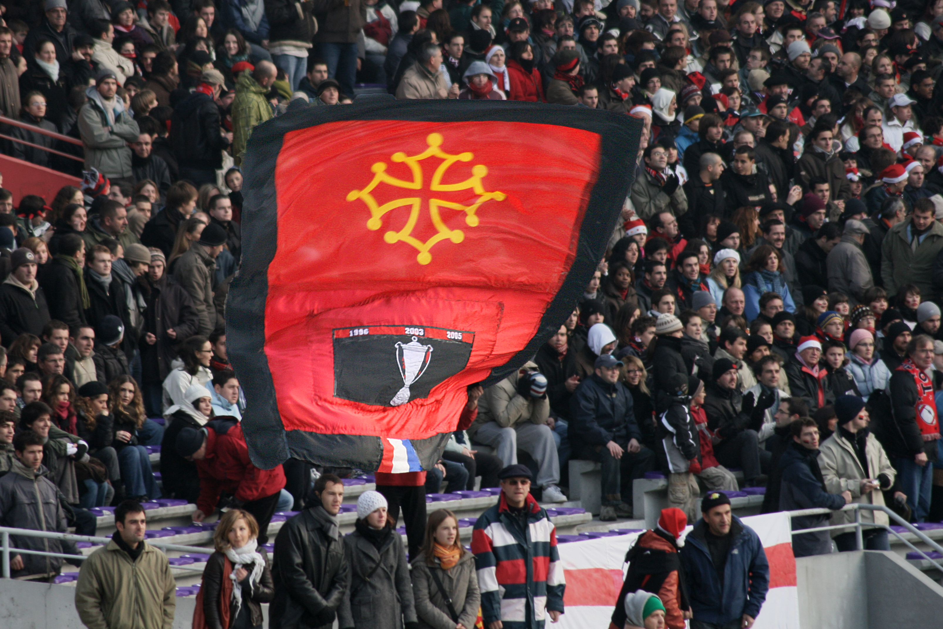 Stade toulousain the heart of the Midi Pyrenees (Stade toulousain le coeur des Midi Pyrénées), Stade Toulousain - Leicester Tigers Heineken Cup in Toulouse Midi Pyrénées